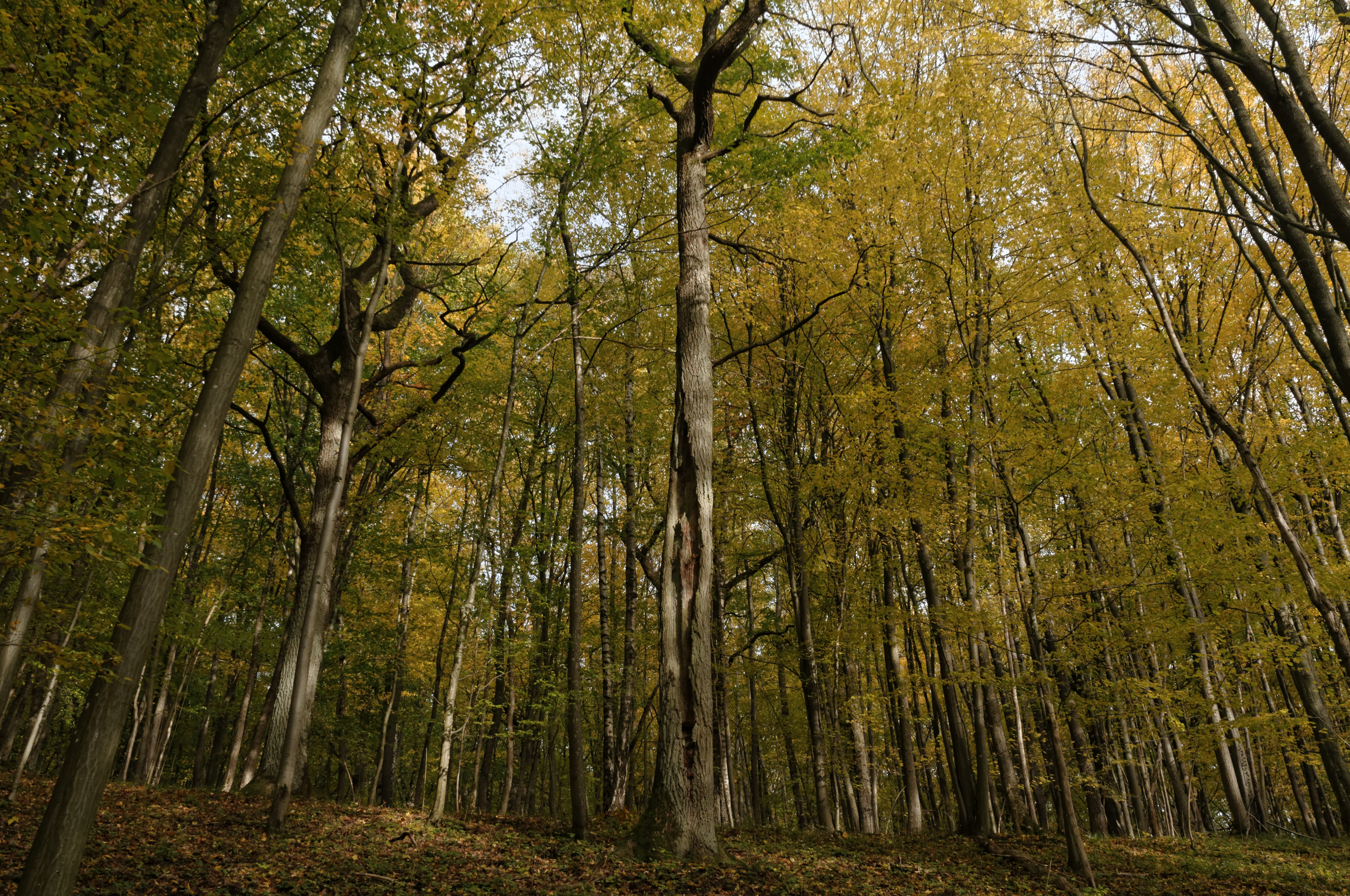 Eichen-Hainbuchenwald im Naturwaldreservat Schwengbrunn, Landkreis Coburg (BY), Oktober 2017